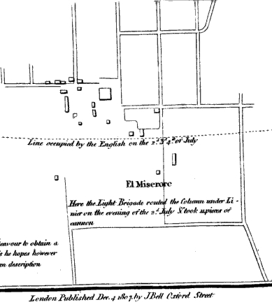 Miserere, línea ocupada por los británicos el 2 de julio de 1807